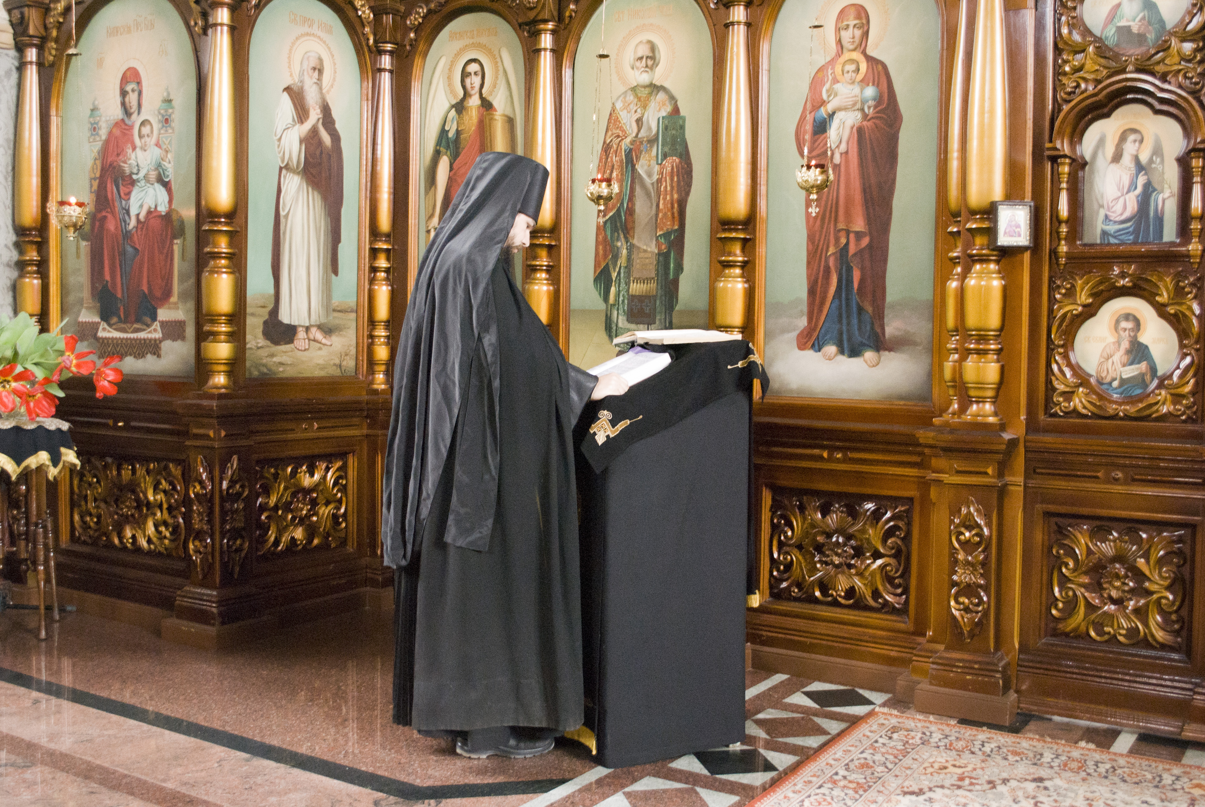 Архимандрит Антоний читает канон на утрене в среду первой седмицы Великого поста. Храм Иоанно-Предтеченского монастыря, Астрахань.